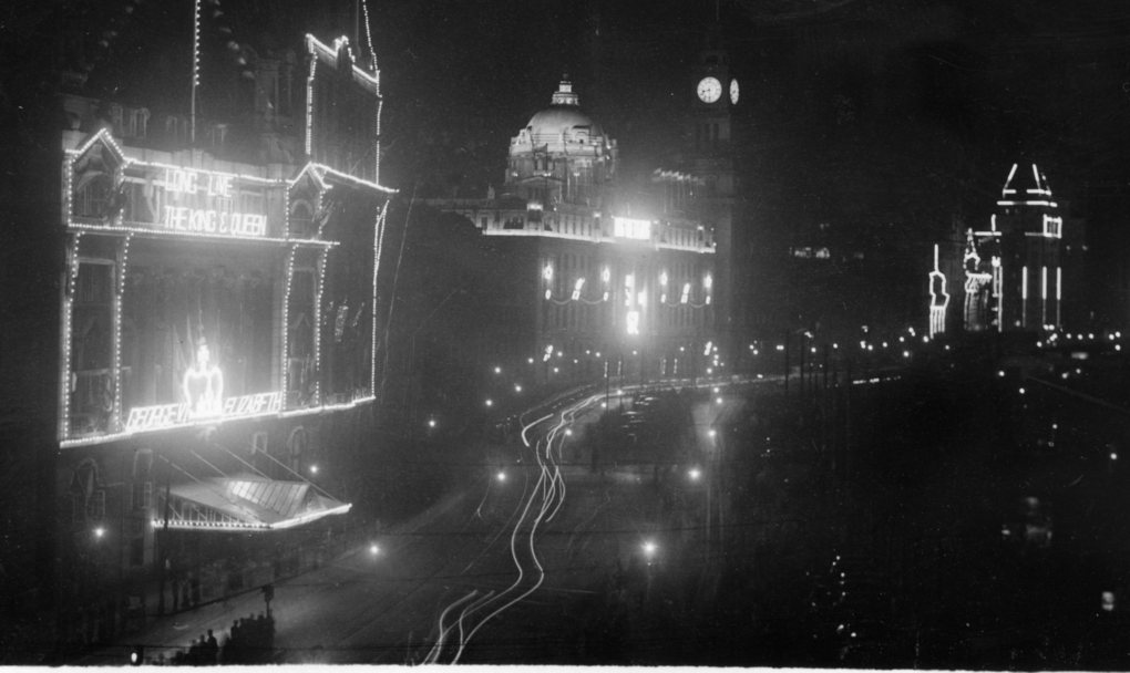 中文（中国大陆）: 外滩夜景旧照